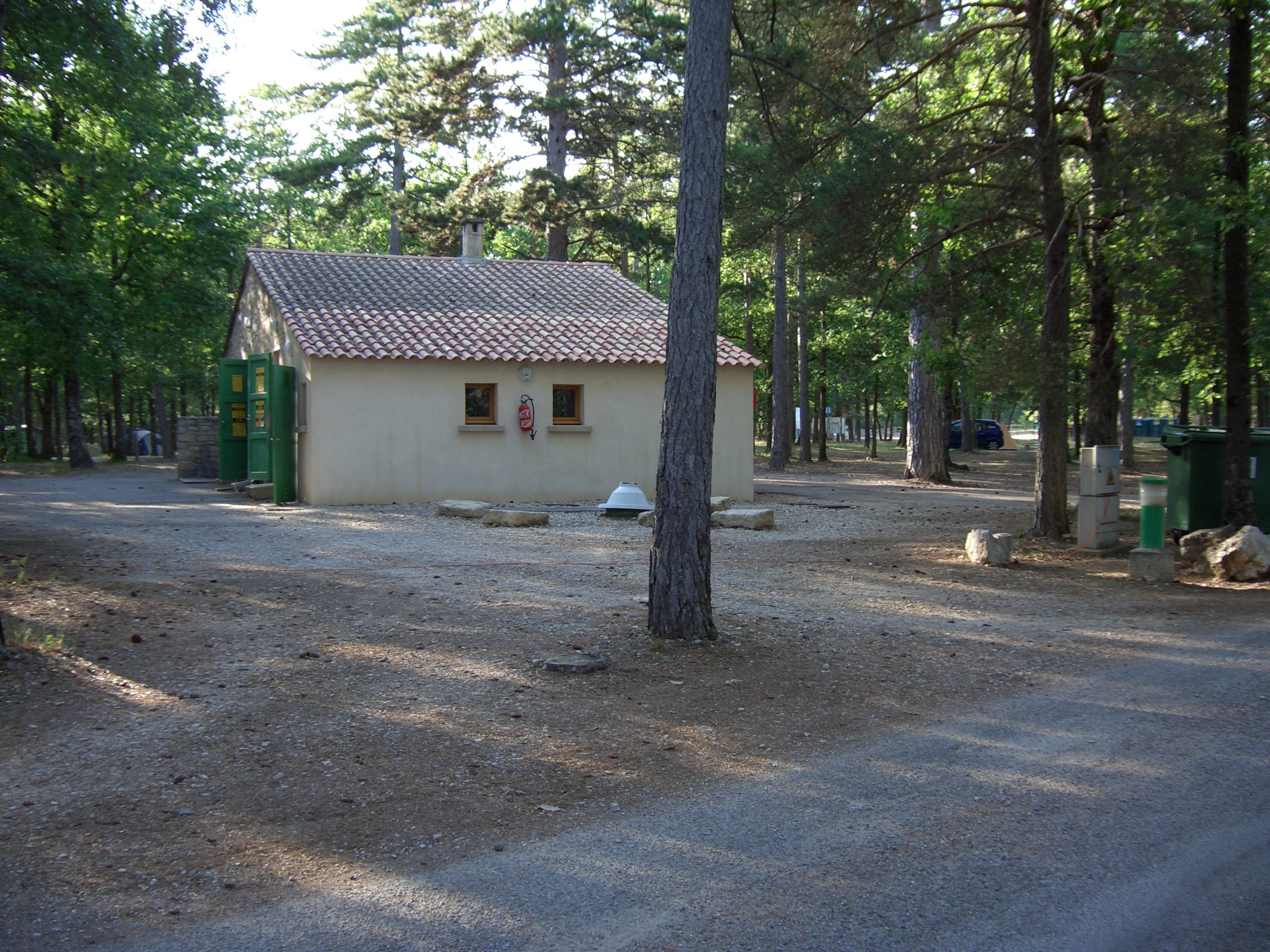 Campsite in Sault, France/ Sanitaires - Place à Camping en Sault, France/ Sanitäranlage des Campingplatzes in Sault Frankreich